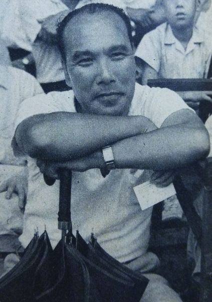 村上一治